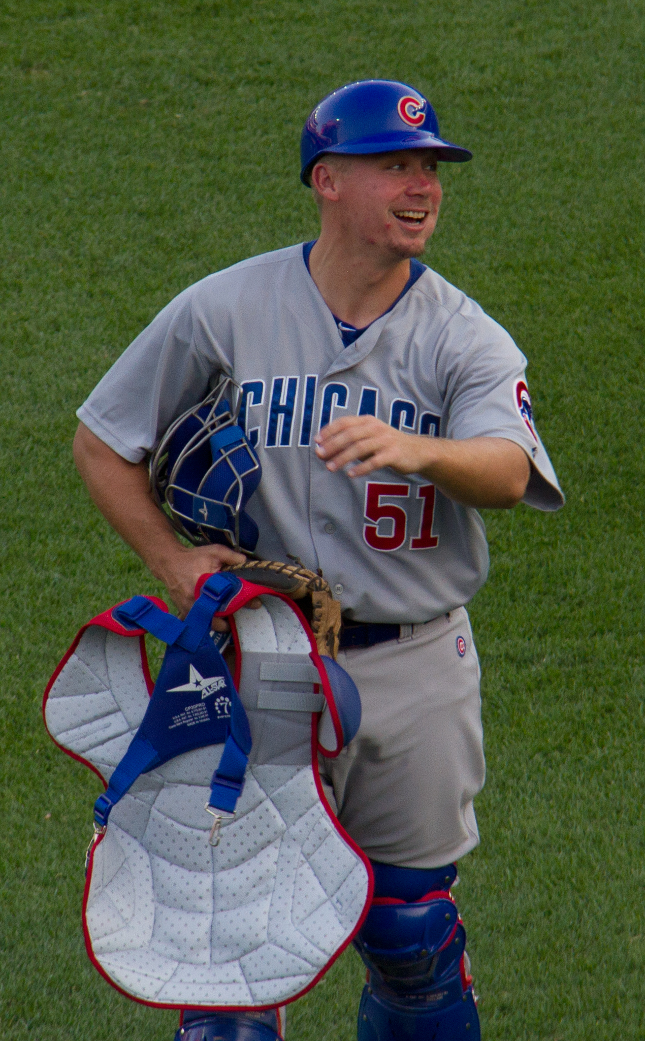 Steve Clevenger